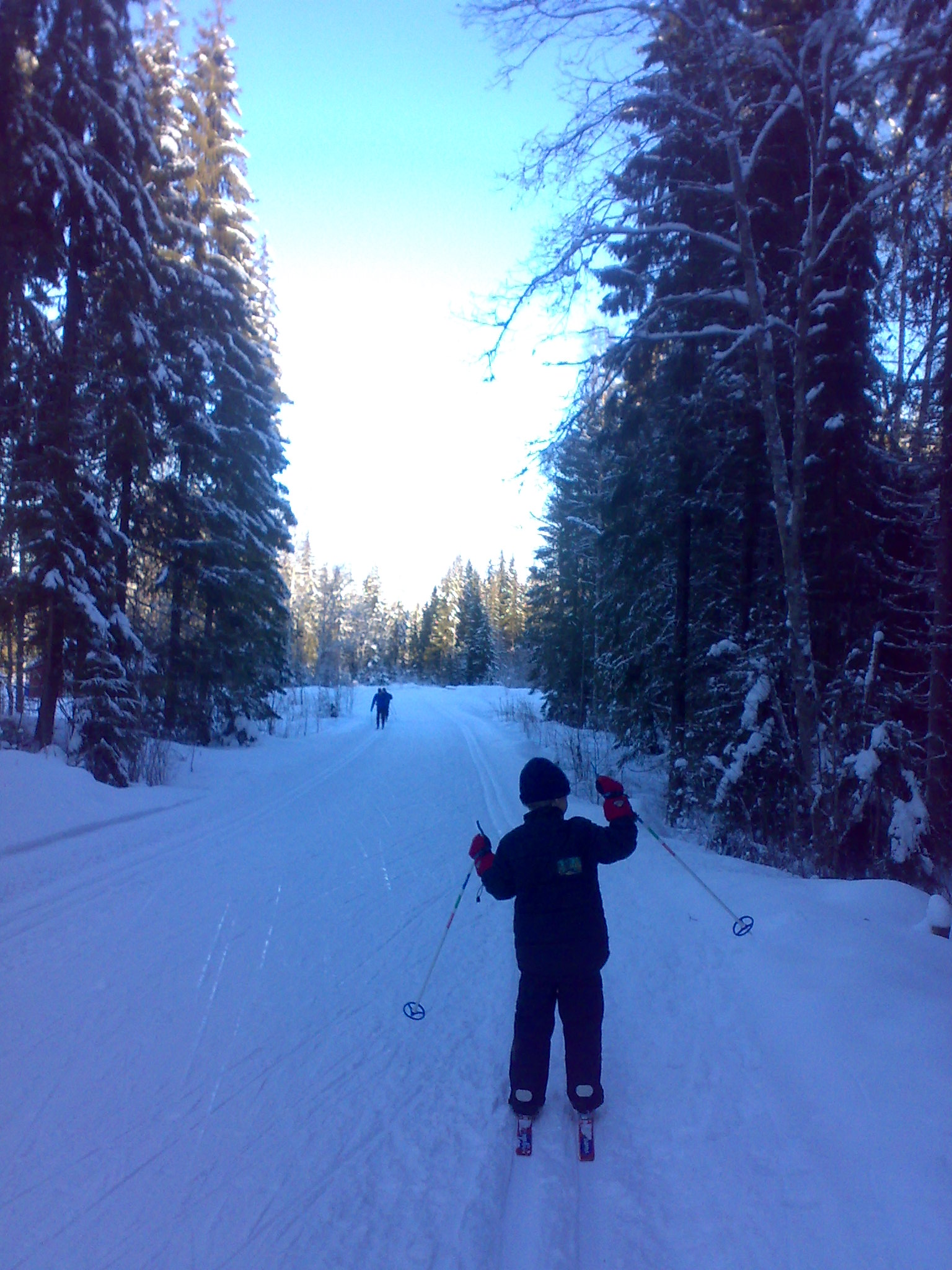 Sørkedalen Oslo Norway